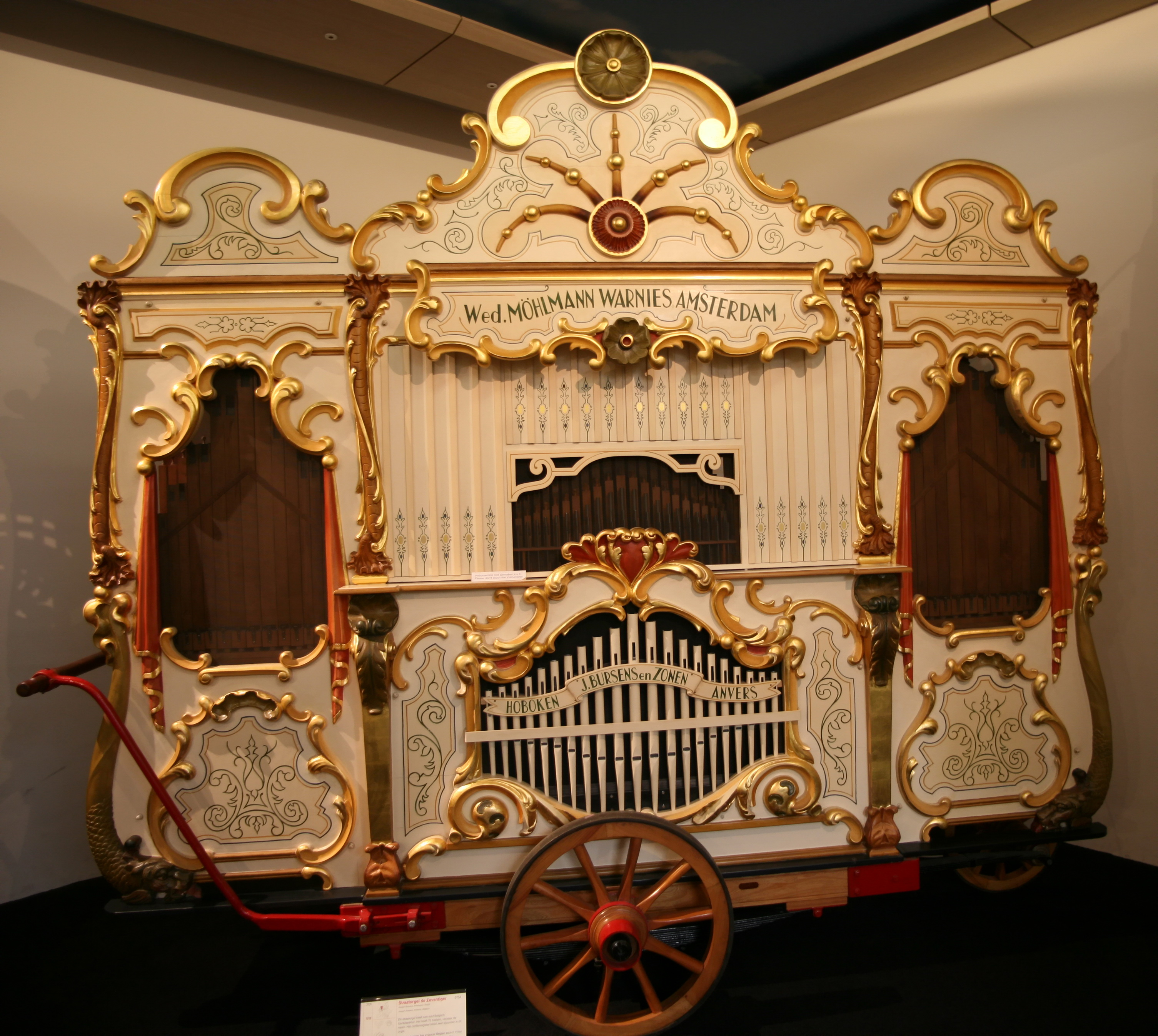 museum speelklok tot pierement (214)